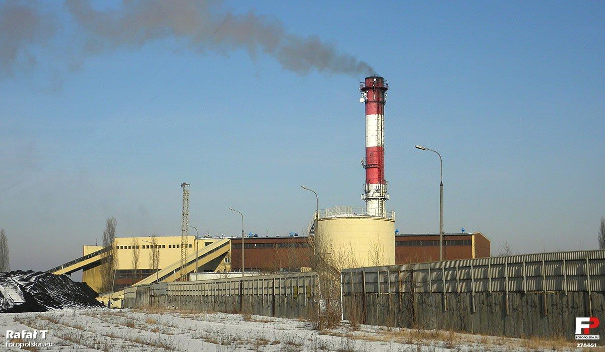 Ciepłownia "Północ".